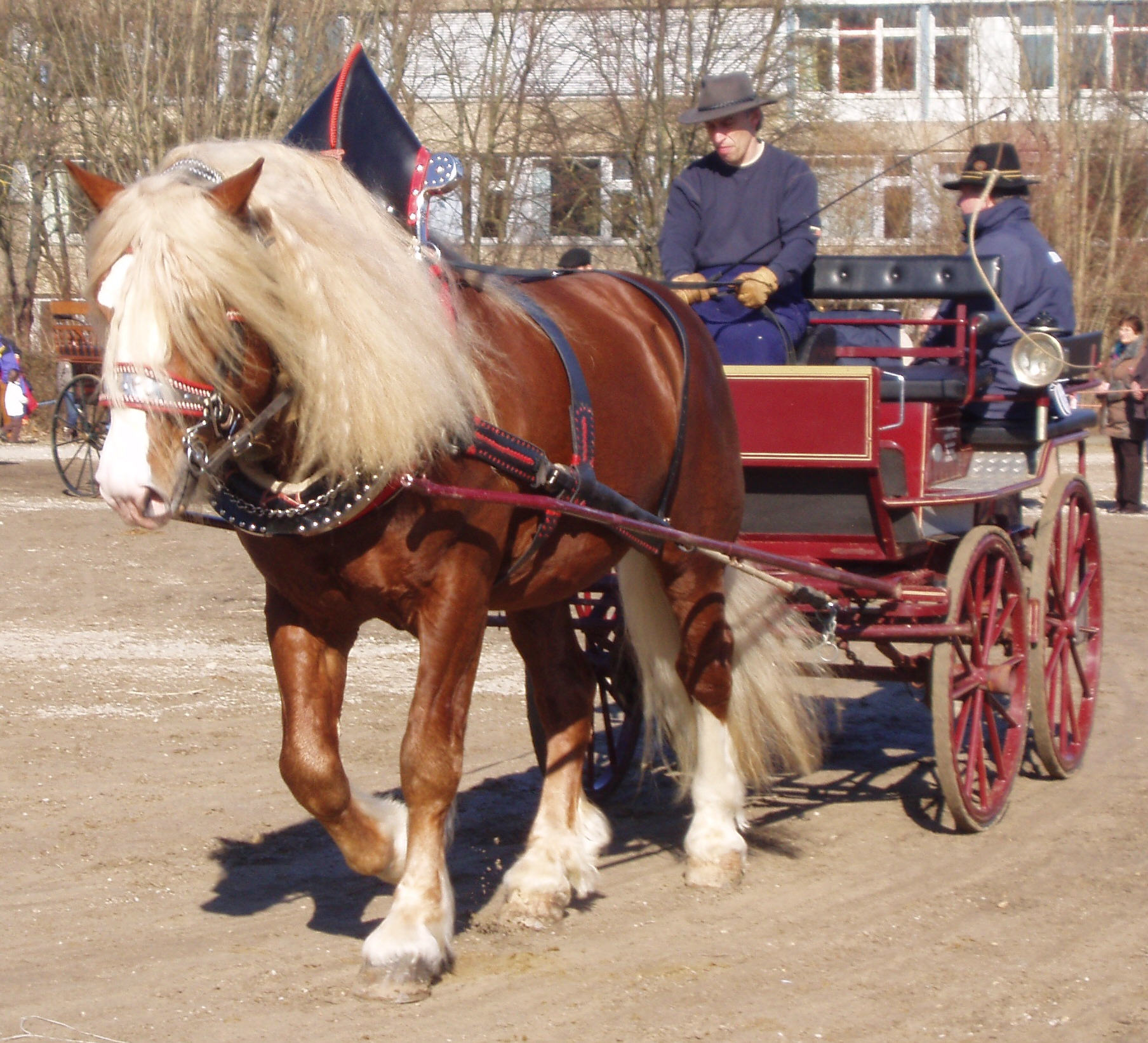 Schwarzwälder